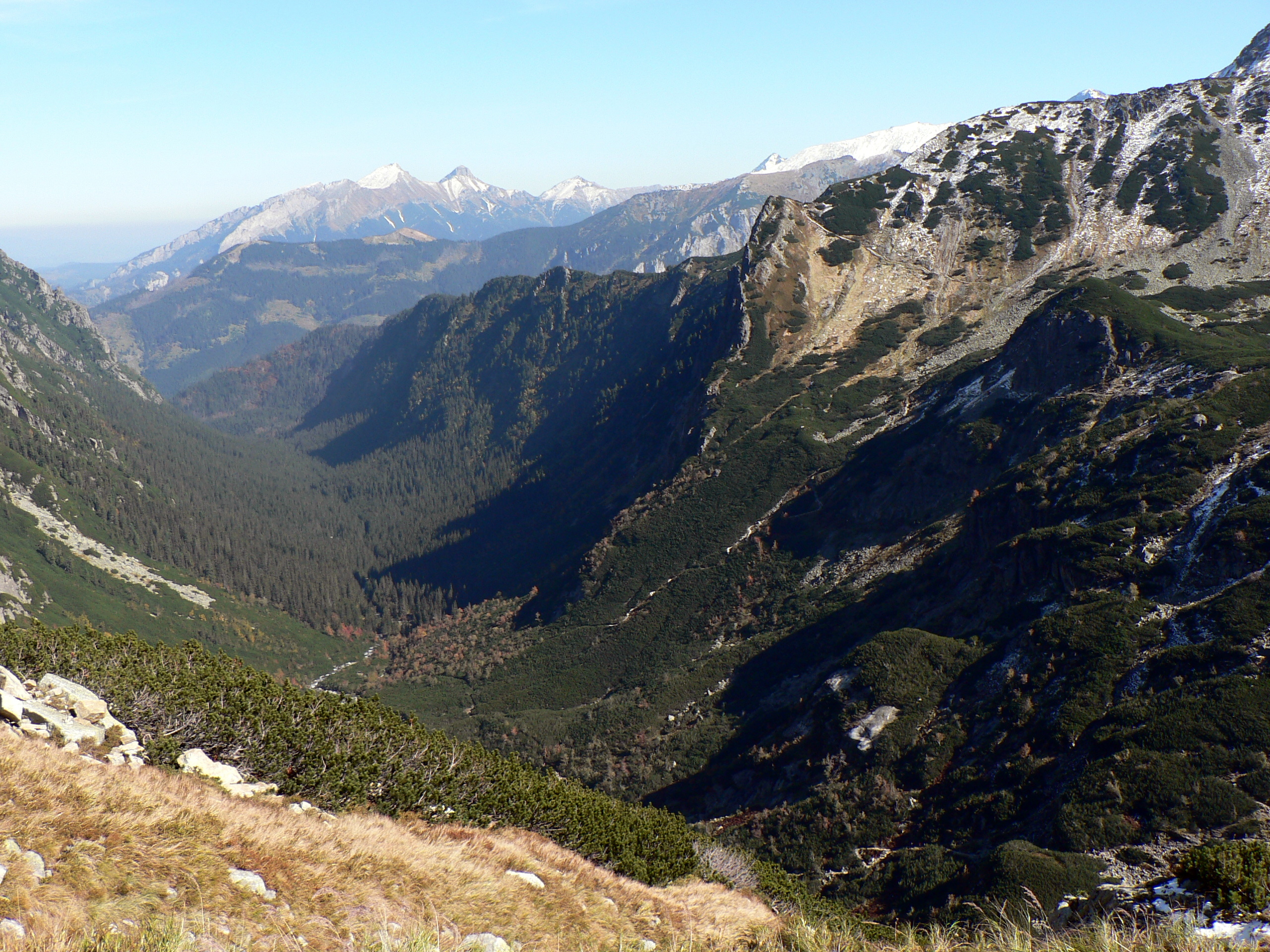 Dolina Roztoki ze szlaku na Krzyżne. W tle Tatry Bielskie z Muraniem, Nowym Wierchem, Hawraniem i Płaczliwą Skałą